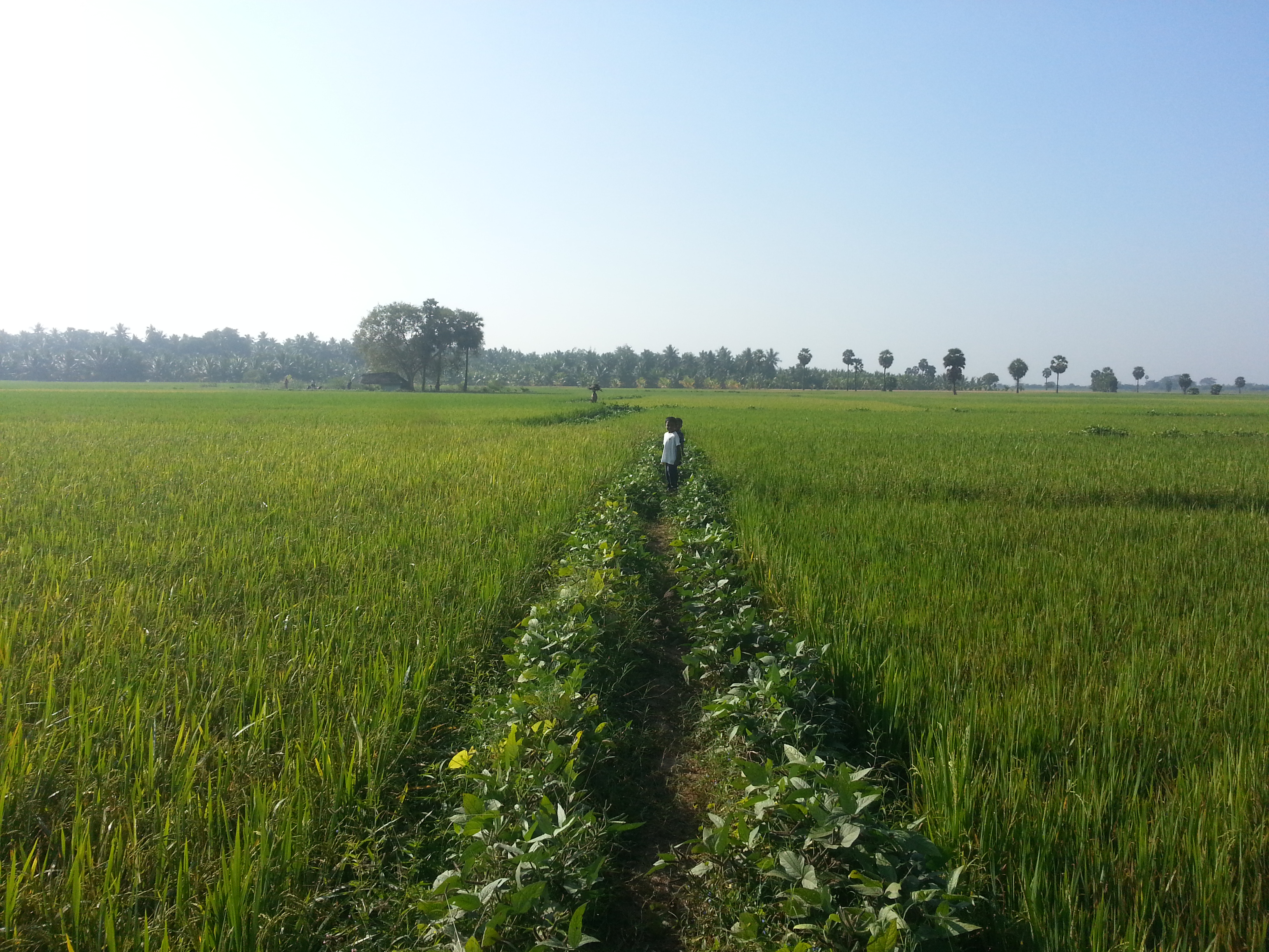 முடச்சிக்காடு mudachikkadu